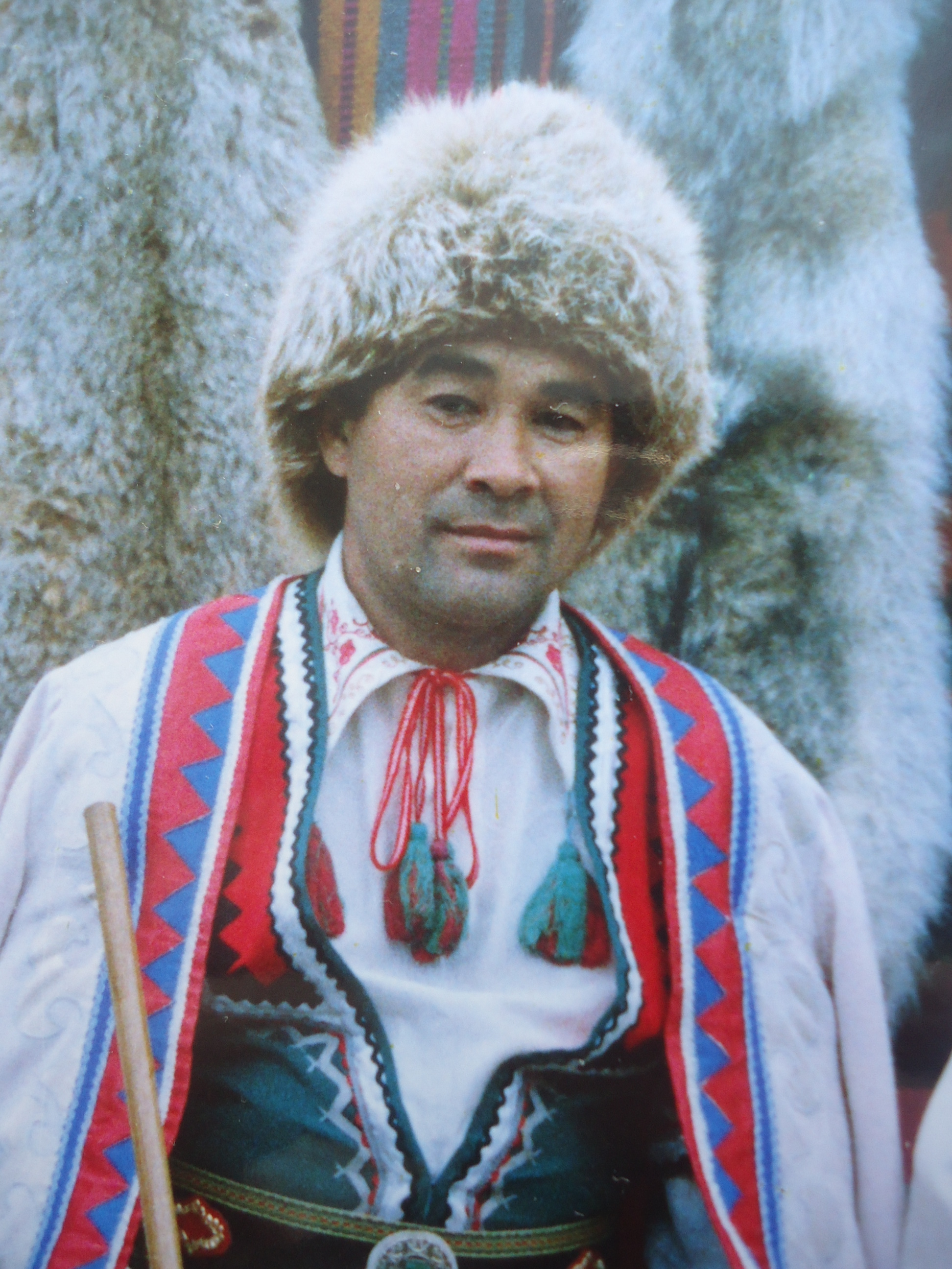 Башҡортса: Башҡортостандың Баймаҡ районы Байыш ауылында тыуған һәм шунда йәшәй. Башҡорт халыҡ йырҙарын оҫта башҡарыусы.